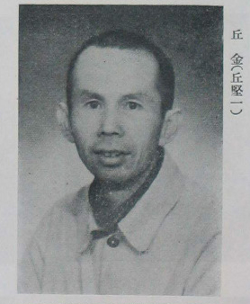 中國人民政治協商會議第一屆全體會議代表